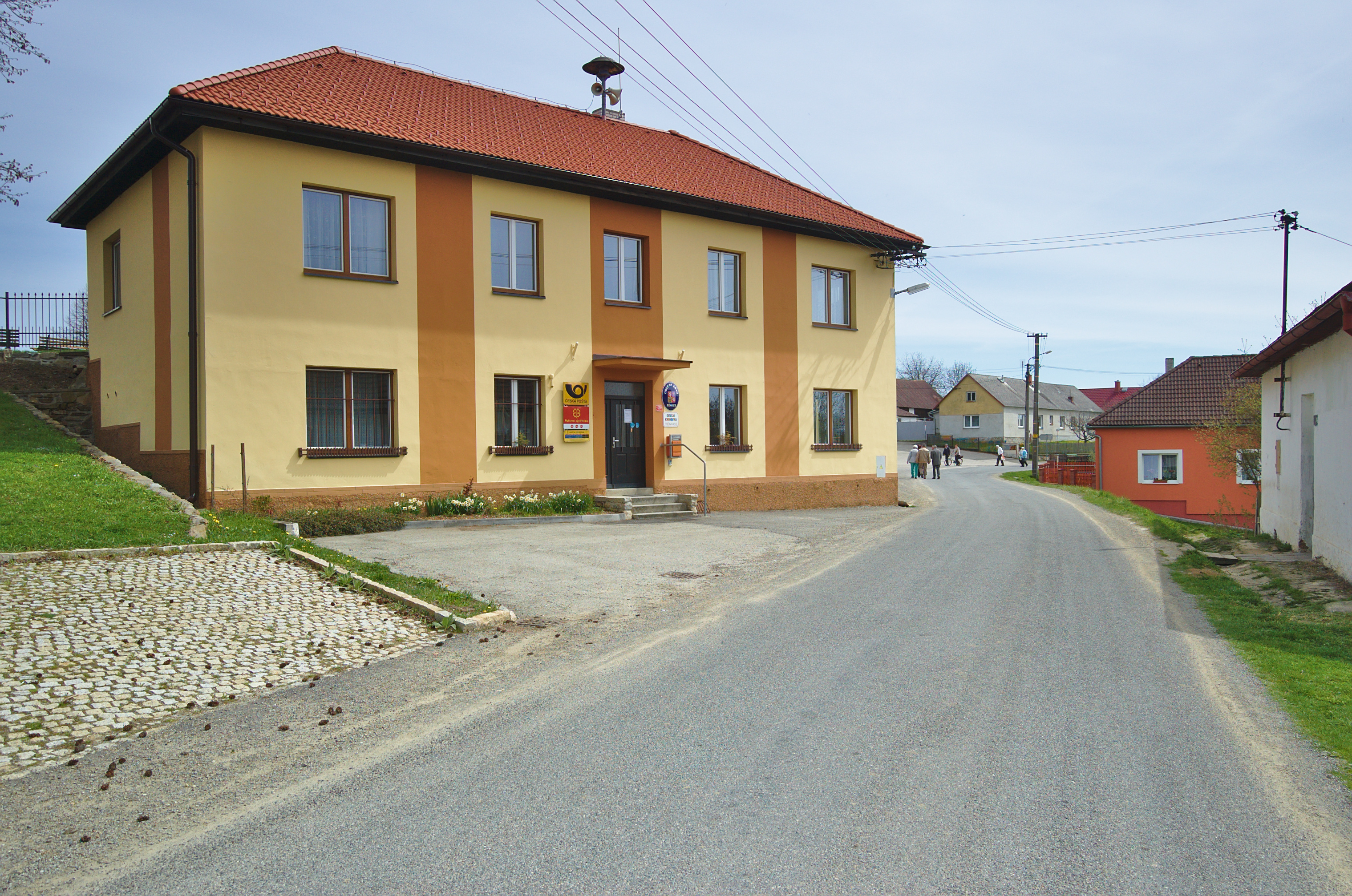 Obecní úřad a pošta, Těmice, okres Pelhřimov Project: Fotíme Česko